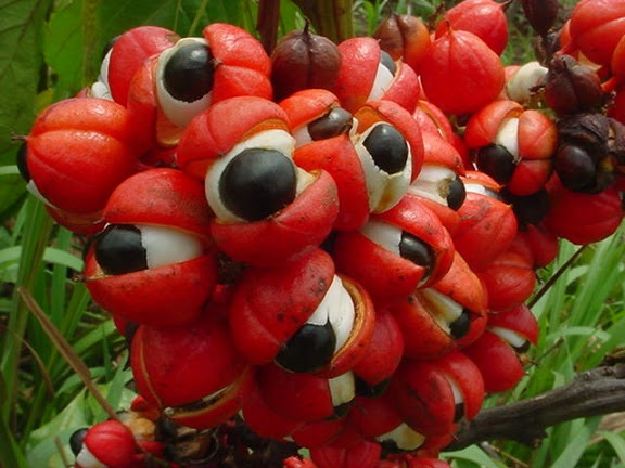 A fruta que envolve a semente do guaraná. Fotografado na Zona Rural de Ariquemes-RO